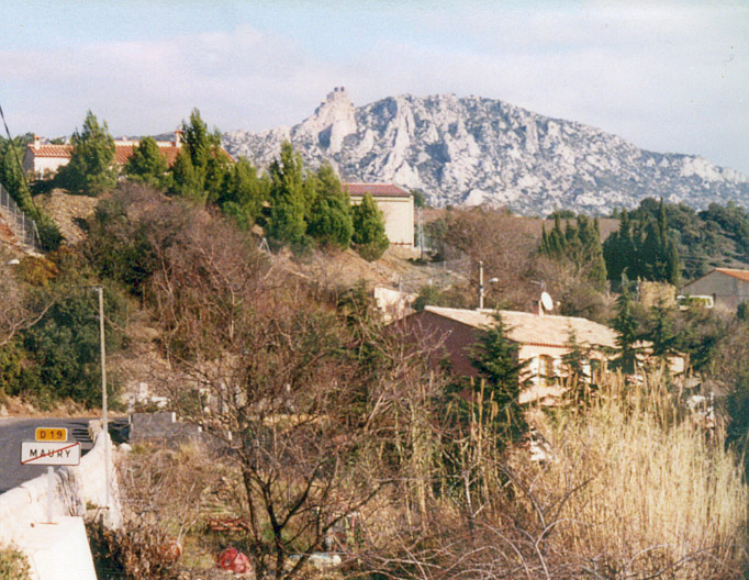 Maury